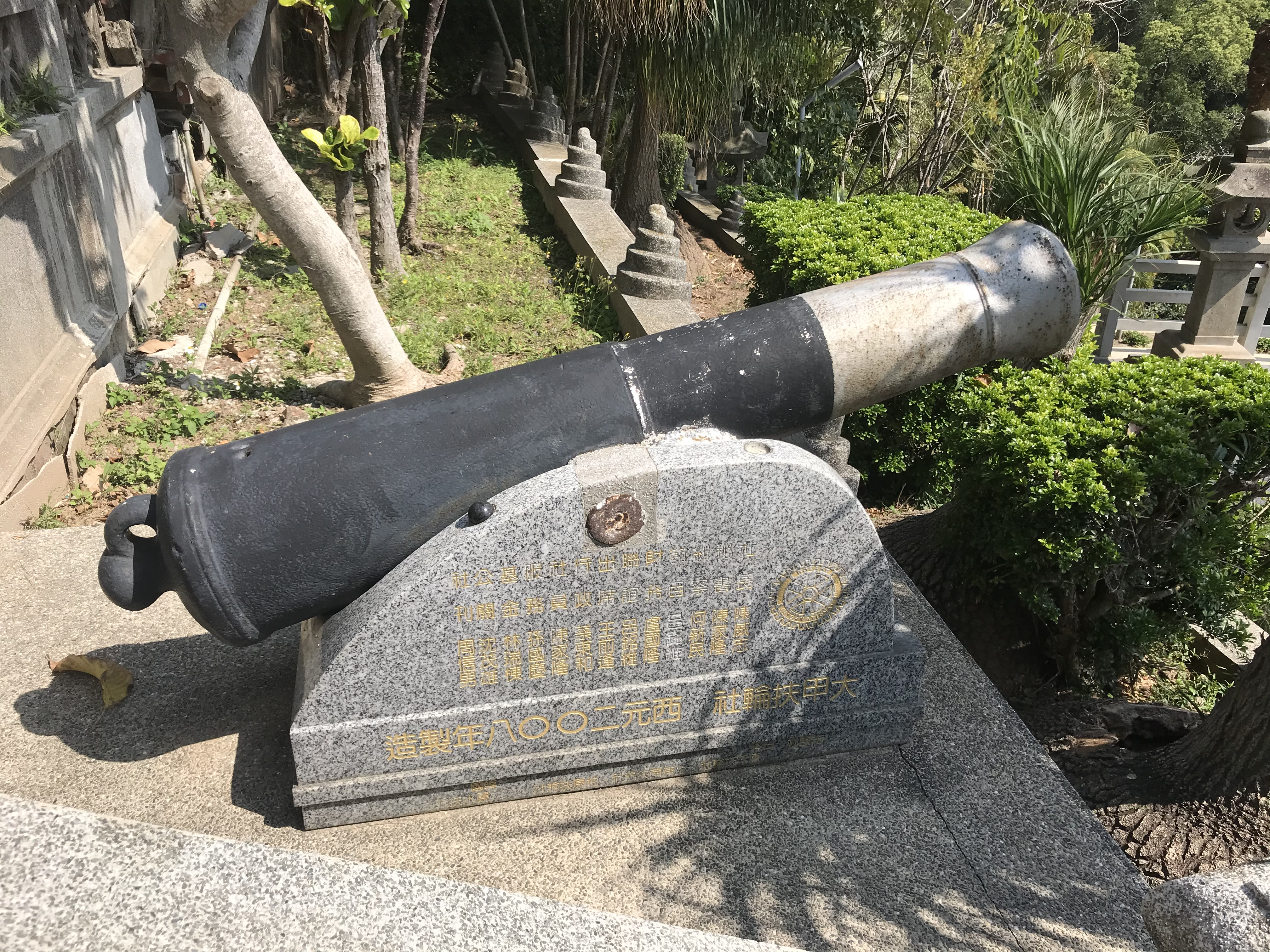 鐵砧山國姓廟古砲